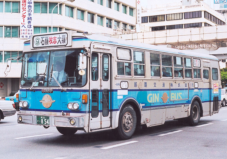 那覇交通 BU04 市内線2ドア車